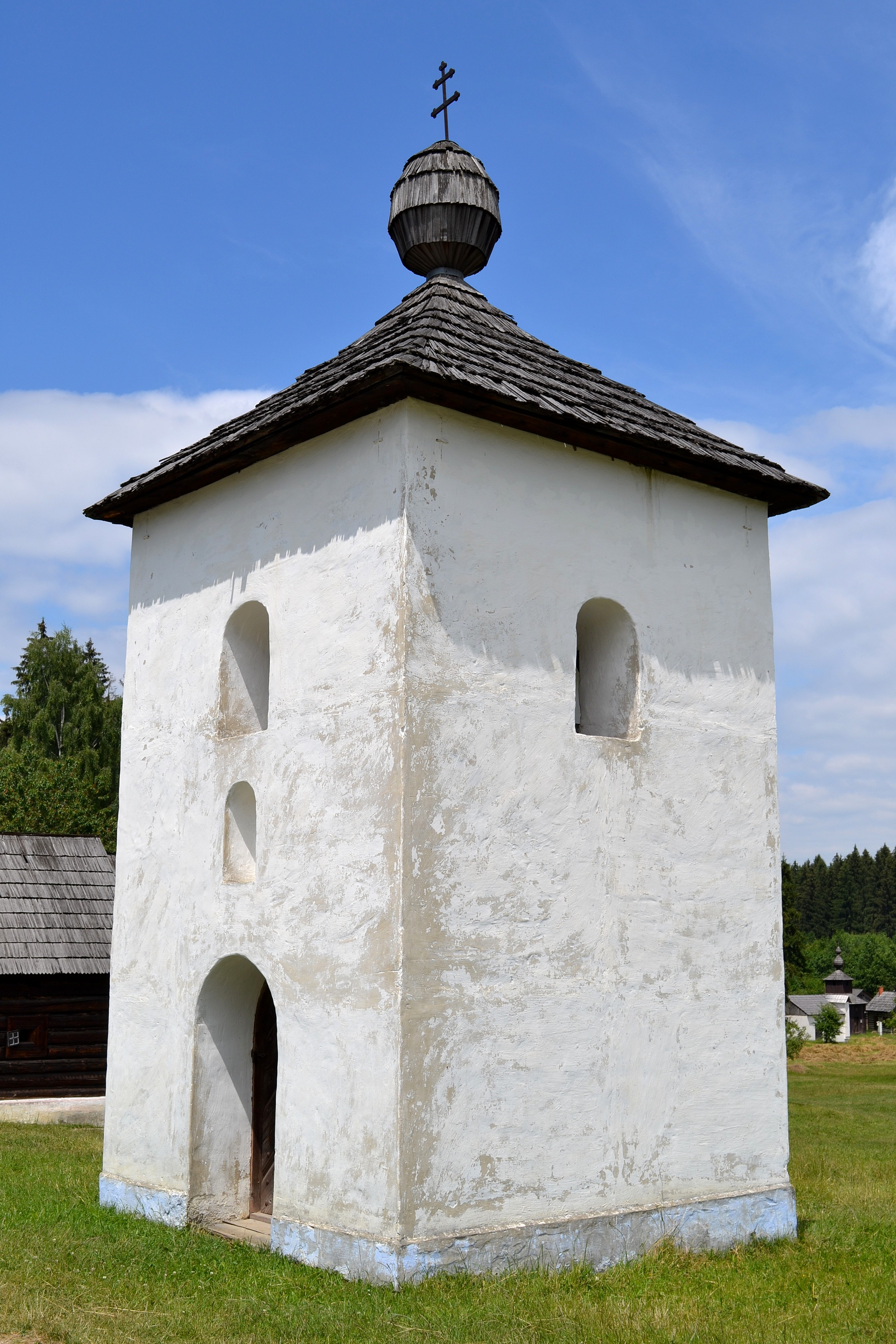 Zvonica z Ondrašovej (okr. Turčianske Teplice) v Múzeu slovenskej dediny v Martine